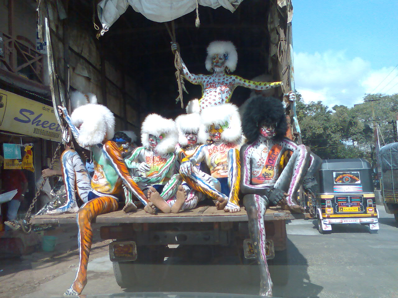 Huli Vesha (Tiger Dance)